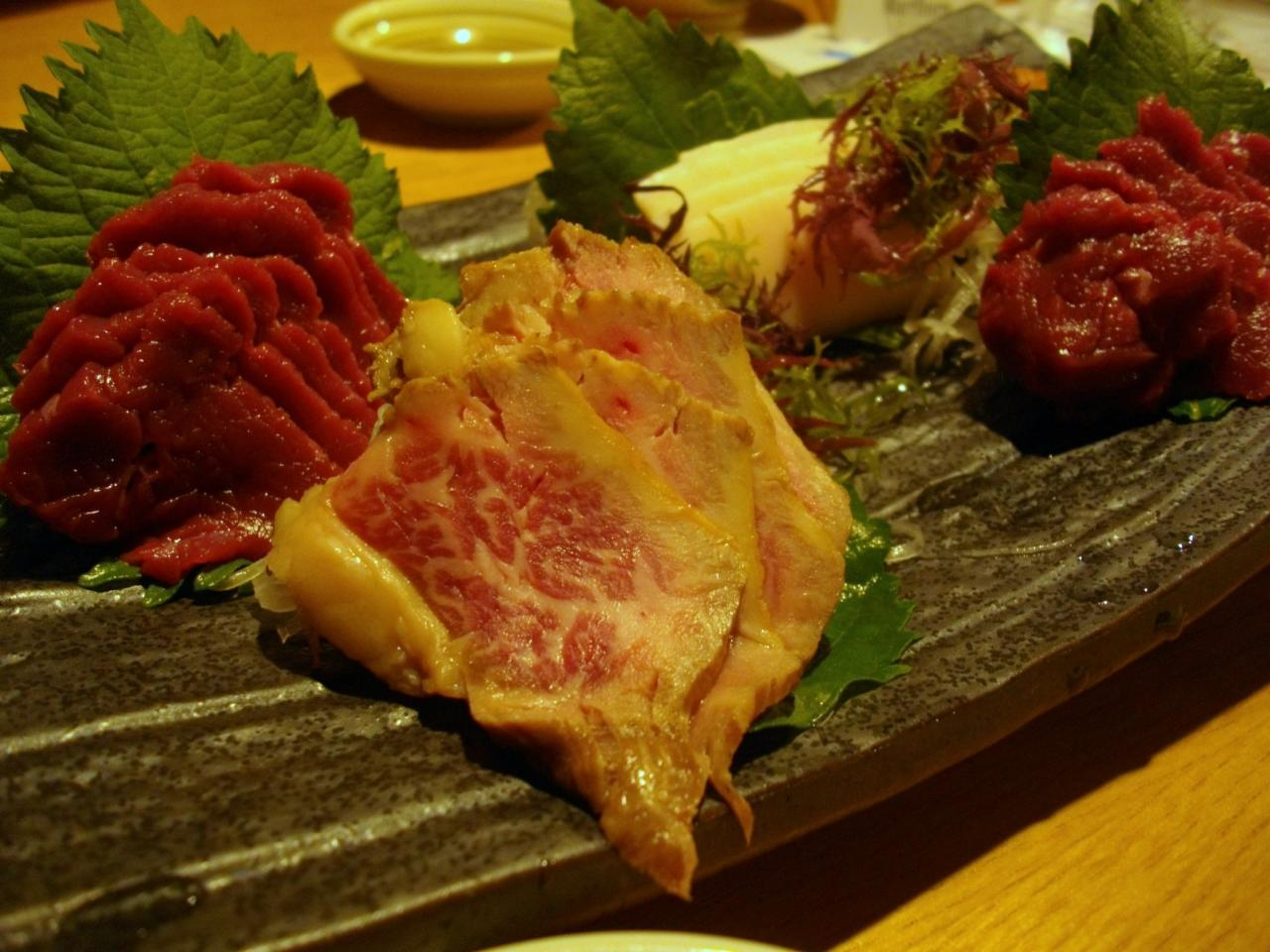 馬刺し盛り合わせ